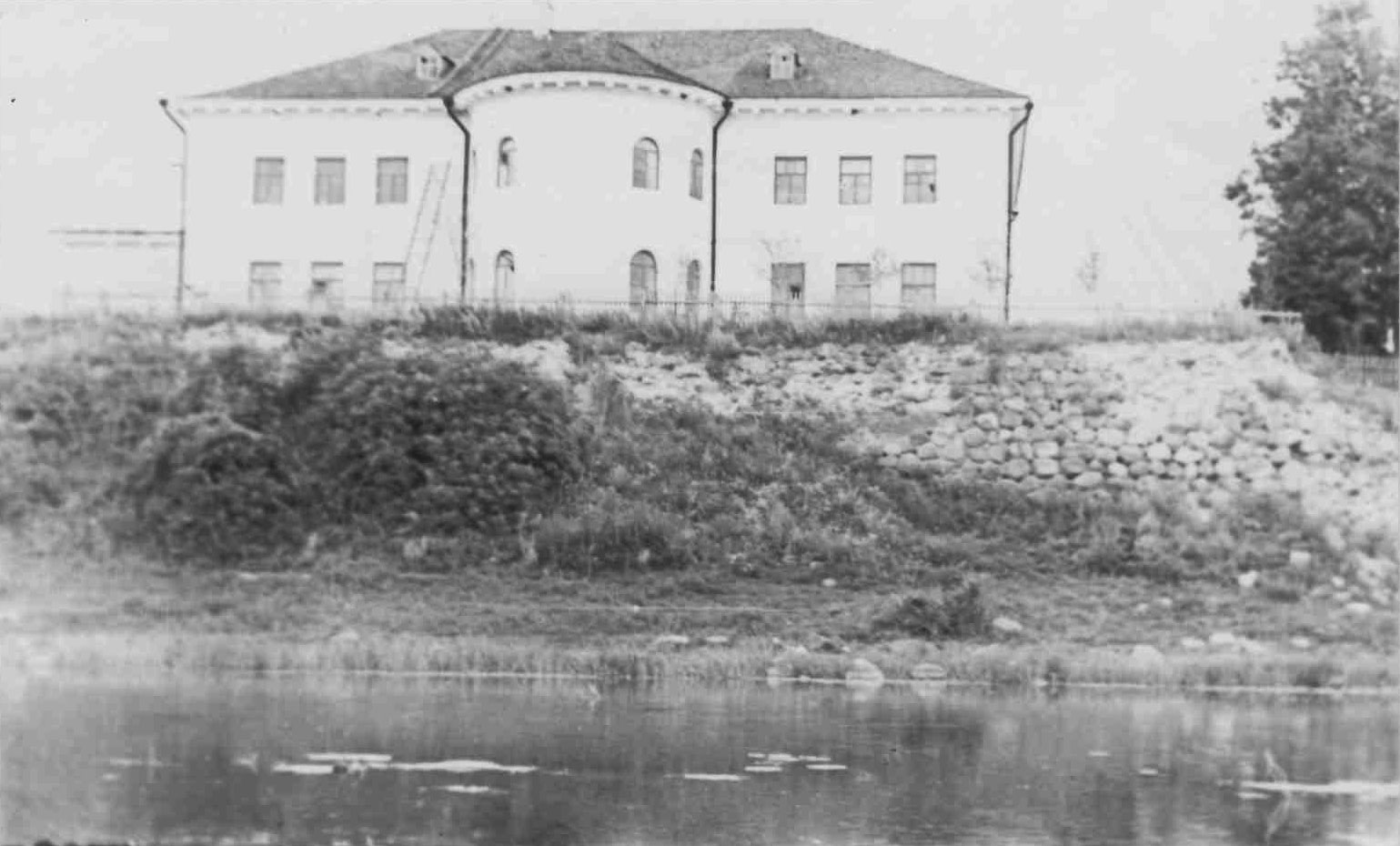 Беларуская (тарашкевіца): Бярэзань (Biarezań), сядзіба Патоцкіх (Patocki)